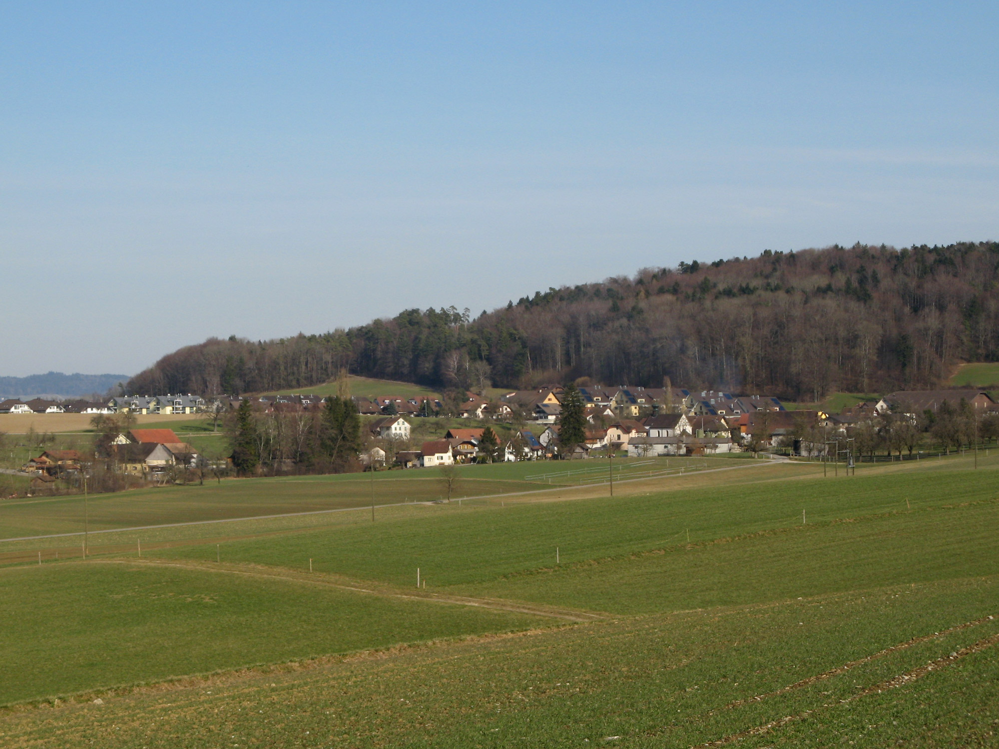 Ansicht von Büttikon